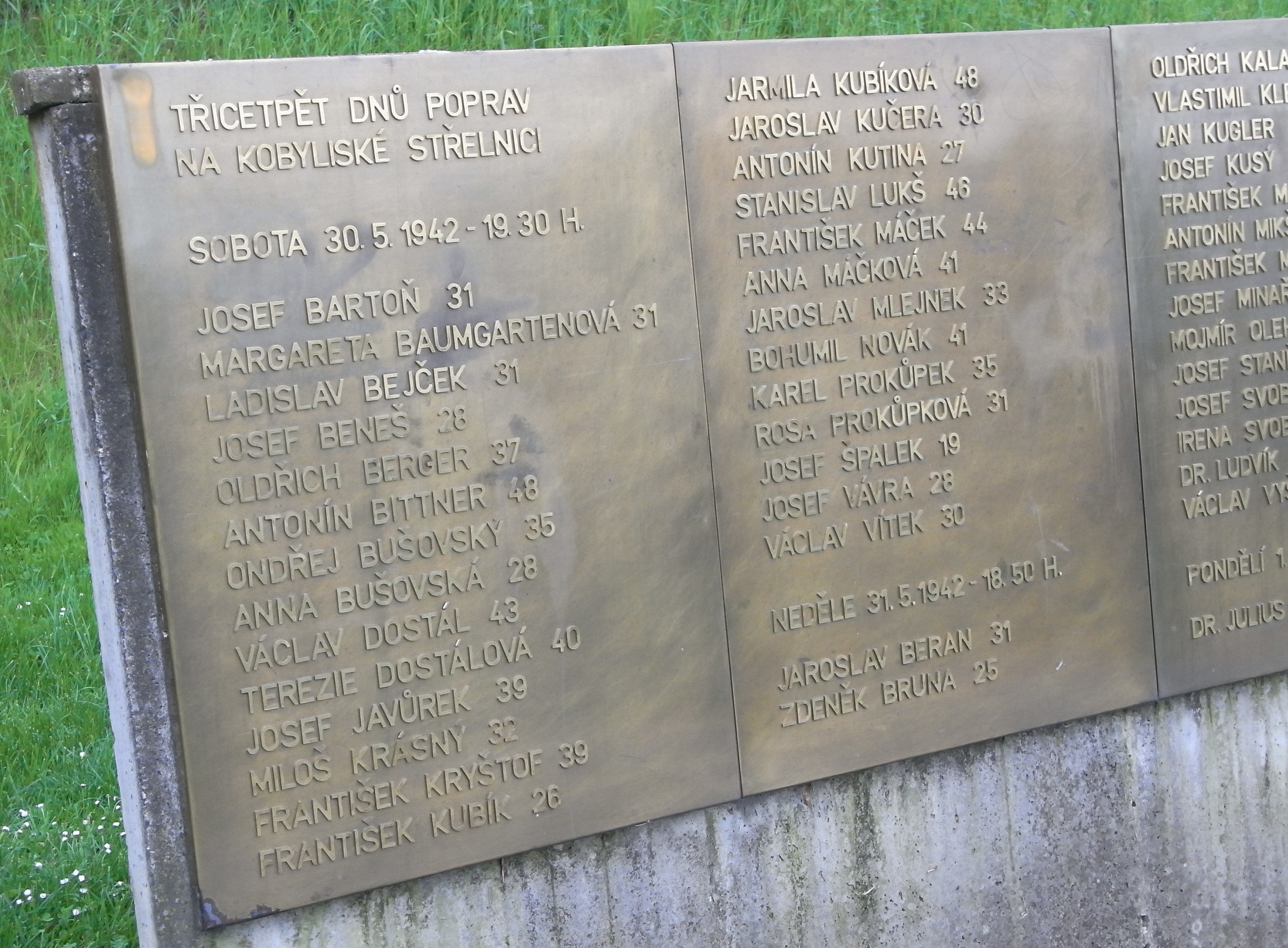 Schießplatz in Kobylisy, Namenstafeln der Opfer der Erschießungen